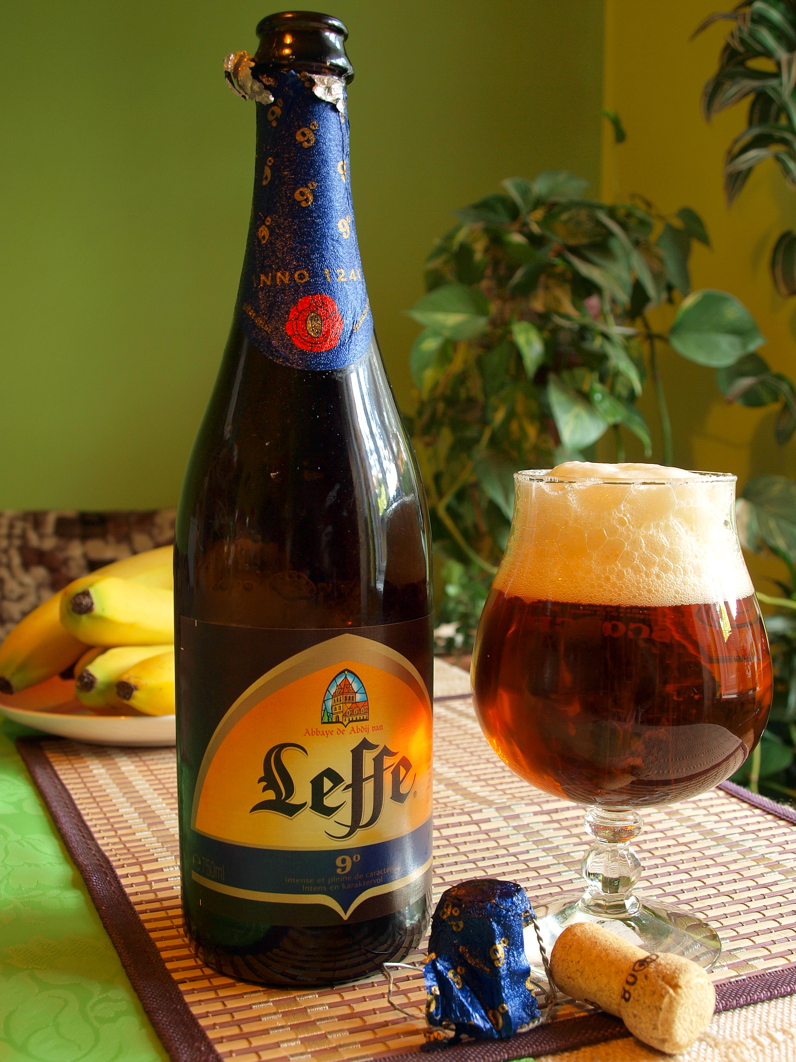 Abbaye de Leffe- bardziej rozwinięta nazwa